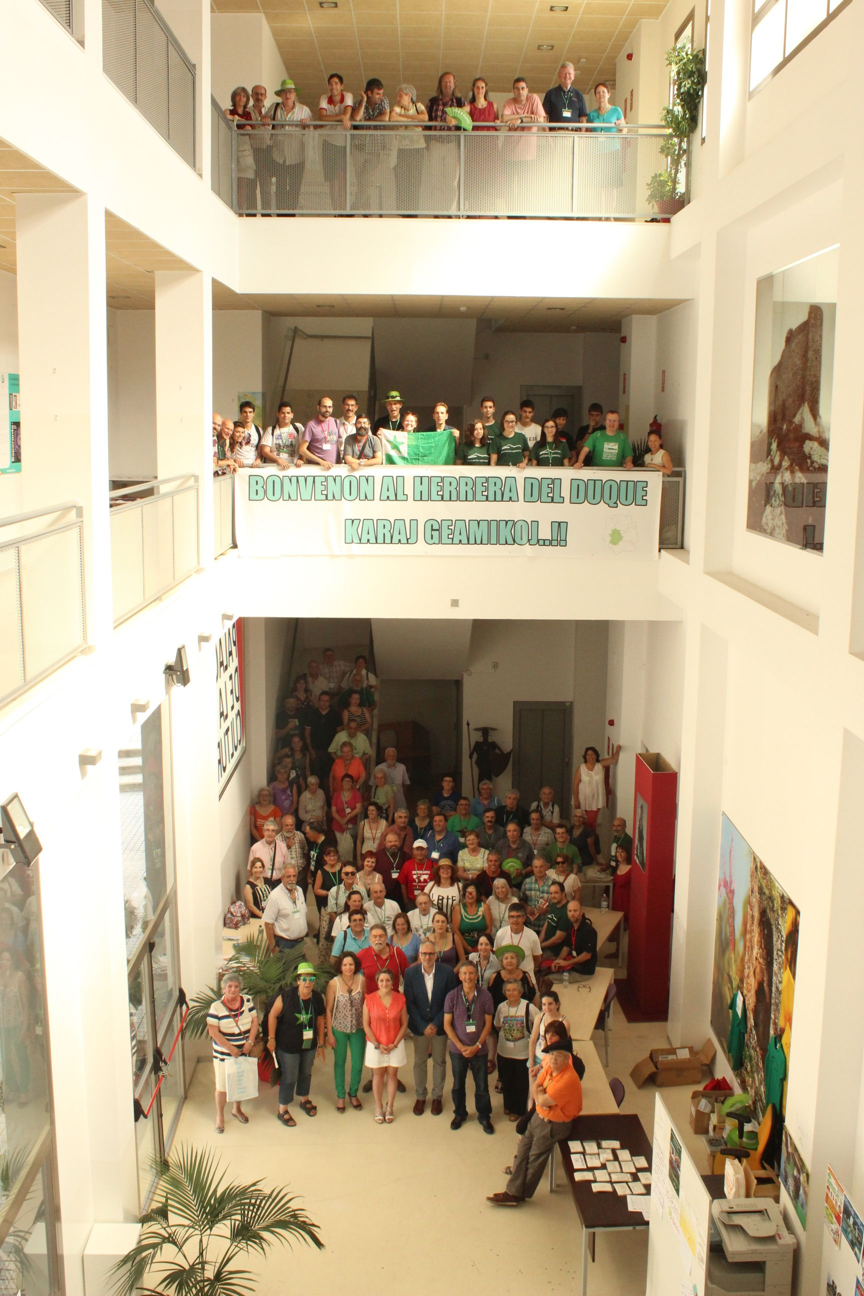 grupa foto de kongresanaro